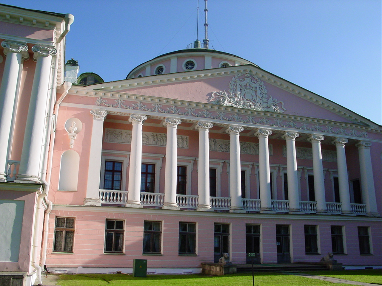 Ostankino palace